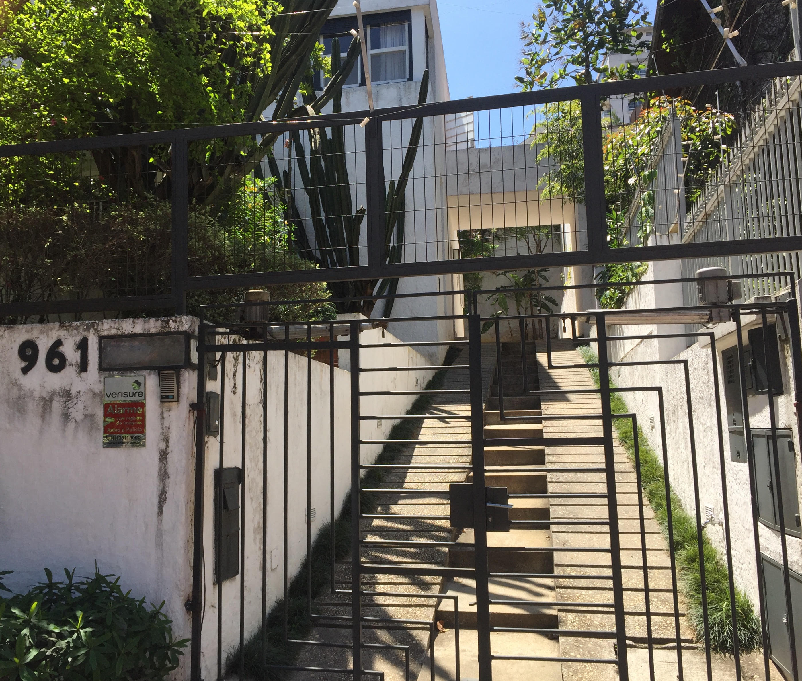 Fachada da Casa Modernista, na rua Itápolis, em São Paulo